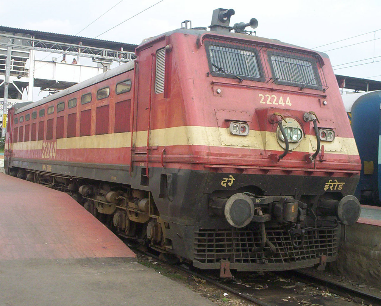 വൈദ്യുതി എഞ്ചിന്‍, ബ്രോഡ് ഗേജ്, ഇന്ത്യന്‍ റെയില്‍ വേ. - മുകളിലെ കമ്പിയില്‍ നിന്ന് വൈദ്യുതി സ്വീകരിക്കാനുപയോഗിക്കുന്ന കൈ മടക്കിവച്ചിരിക്കുന്നു